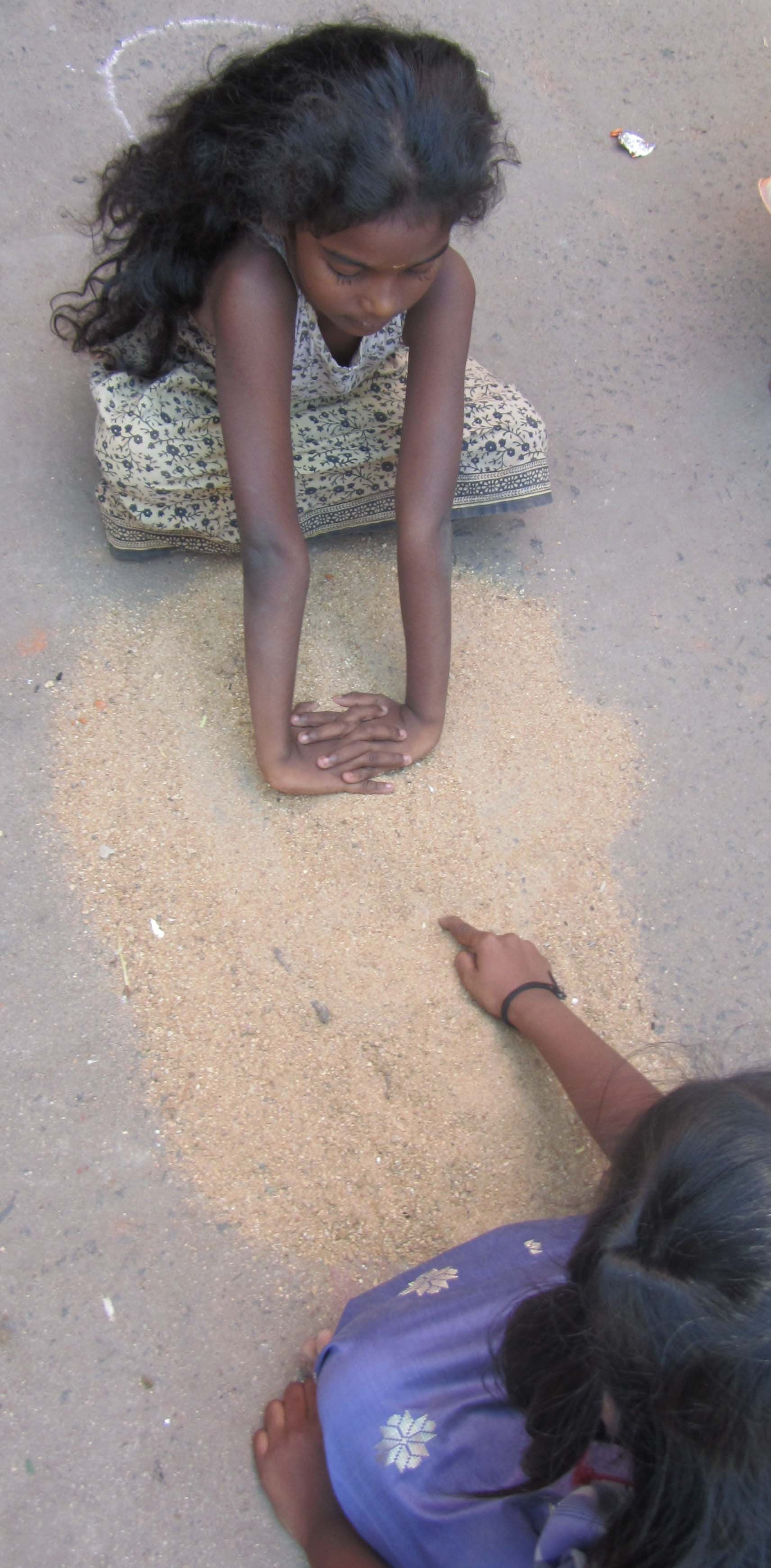 சங்ககாலக் 'காய்மறை விளையாட்டு'. அண்மைய கால 'கிச்சுக் கிச்சுத் தம்பலம்' விளையாட்டு. இரண்டாம் படி